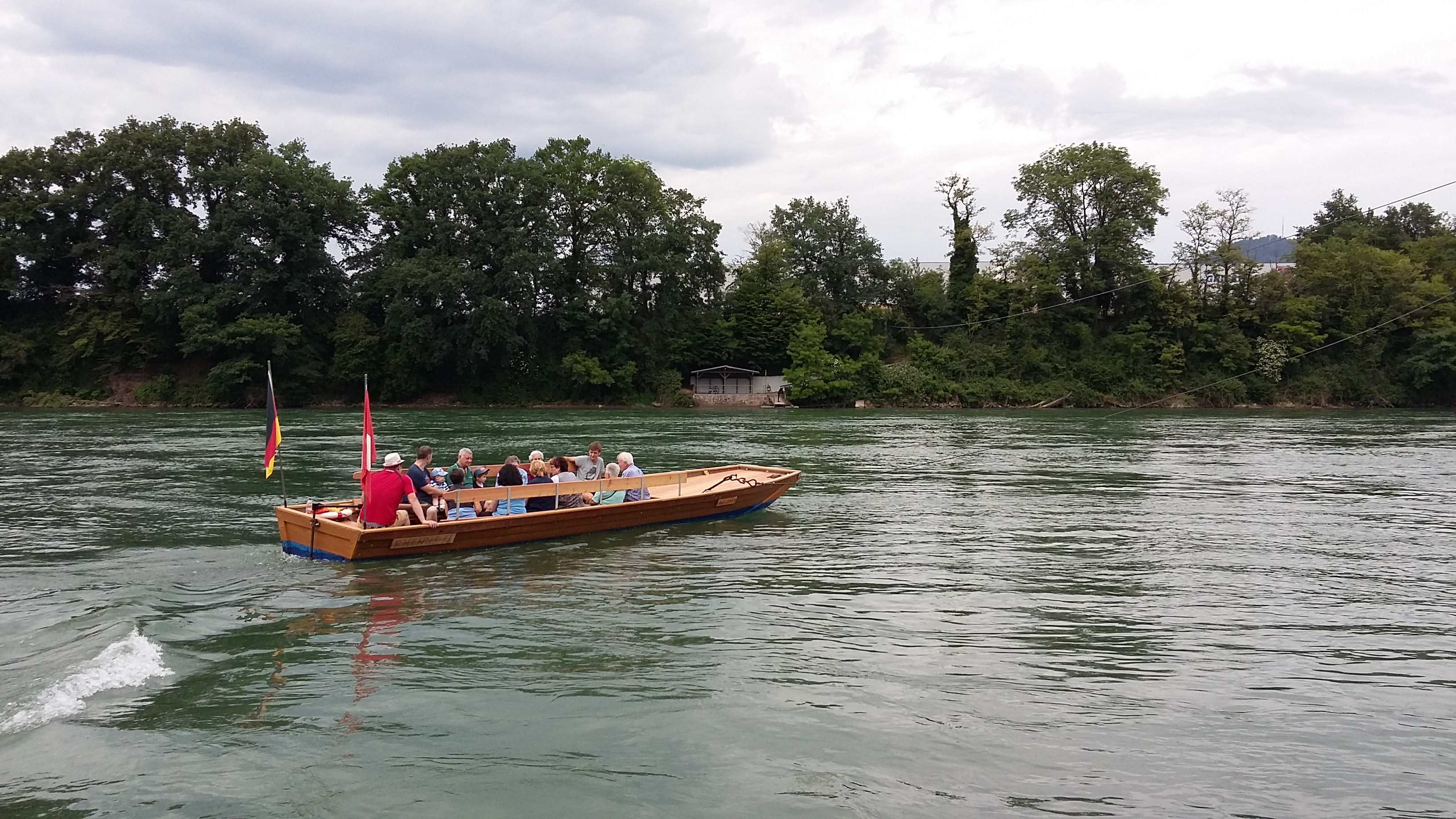 Die Mumpfer Fähre ist erwähnt im Mumpfer Dorfrecht von 1535 und transportiert an Sonn- und Feiertagen viele Ausflügler über den Rhein.